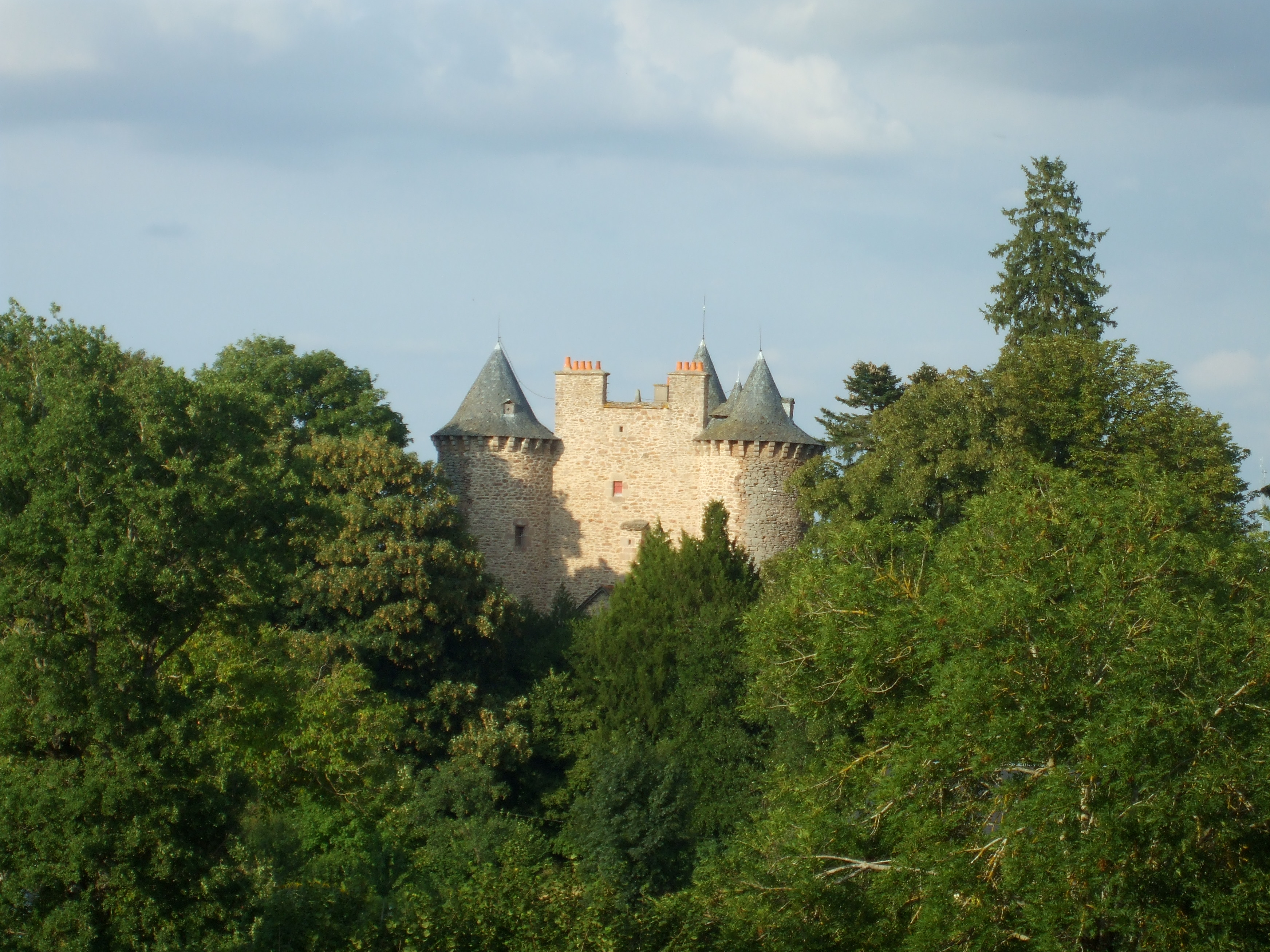 Vue du château de Planèze derrière les arbres